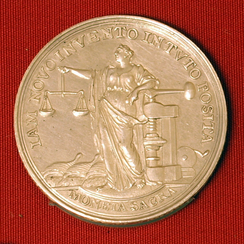 Coin depicting Martinus Holtzhey als muntmeester van Gelderland, 1749